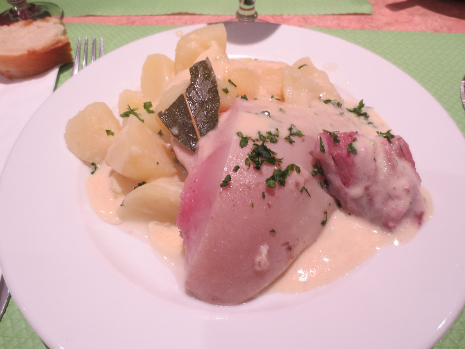 Tête de veau, chez Alex, marché de Louhans en Bresse